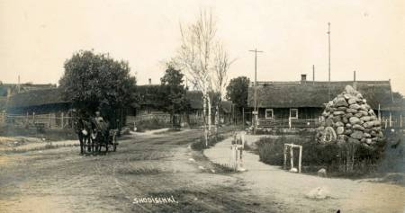 Беларуская (тарашкевіца): Жодзішкі (Žodziški)